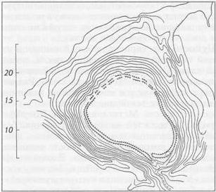 План мсціслаўскага дзяцінца (Замкавай гары)